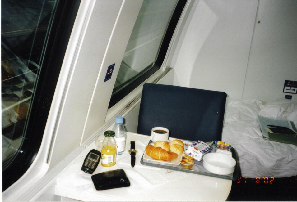 Deluxe-Abteil in einem CityNightLine-Schlafwagen